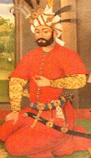 شاه طهماسب اول صفوی، دیوار نگاره در قصر چهل ستون